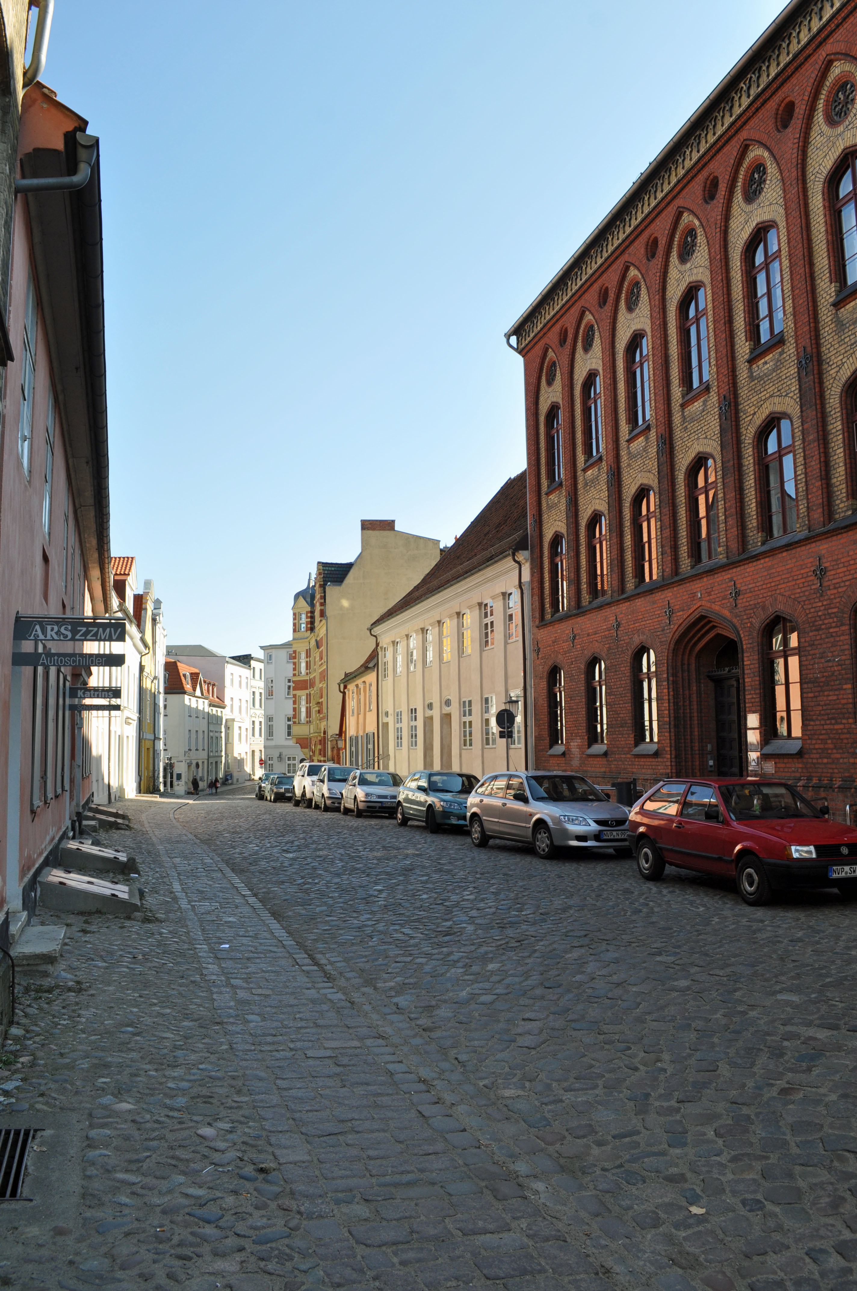 Gebäude bzw. Gebäudedetail in Stralsund. Straße und Hausnummer siehe Dateiname.